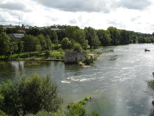 Rio Cávado